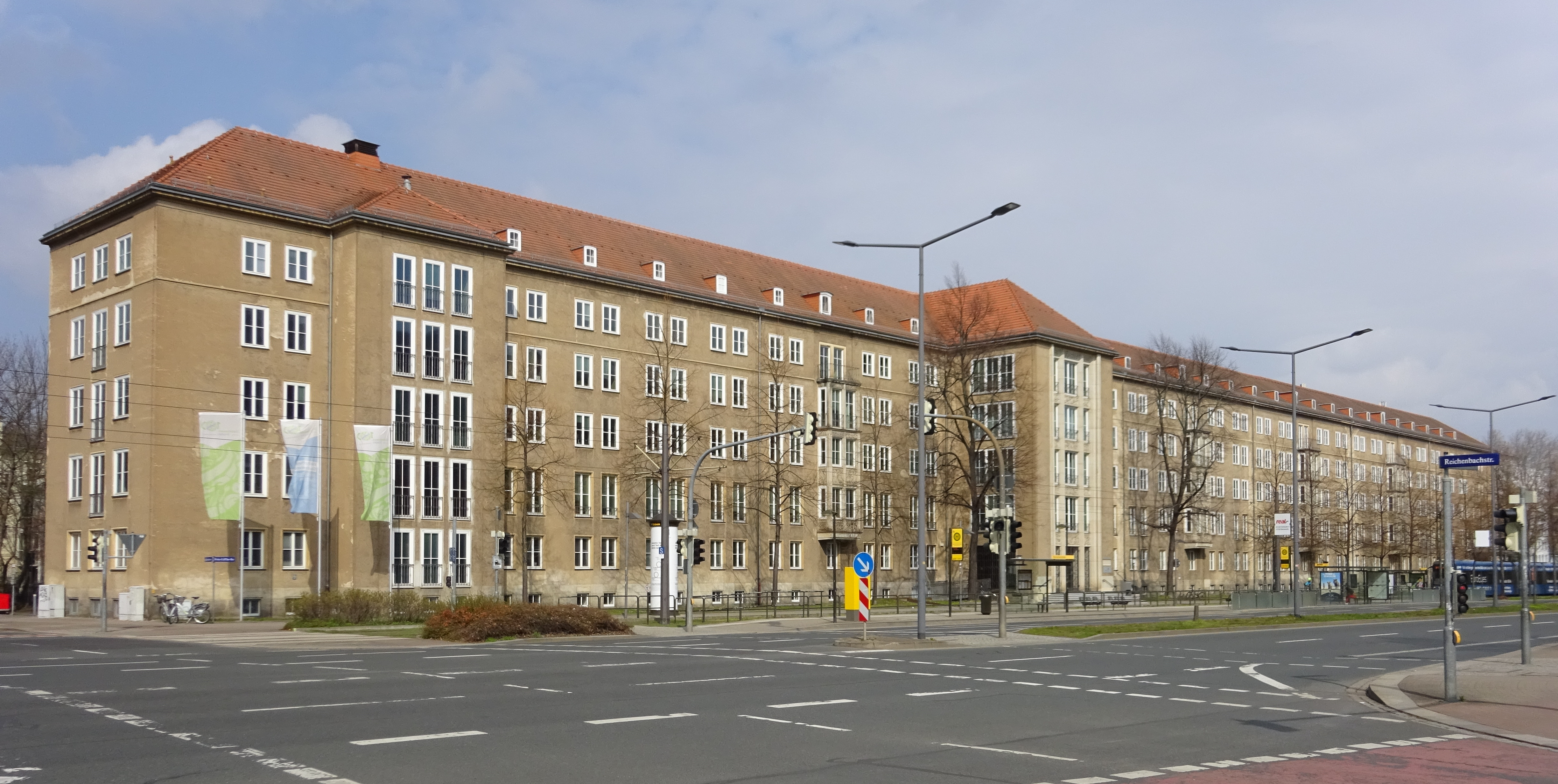 Studentenwohnheim an der Fritz-Löffler-Straße in Dresden, April 2020, Blick von der Kreuzung mit der Reichenbachstraße